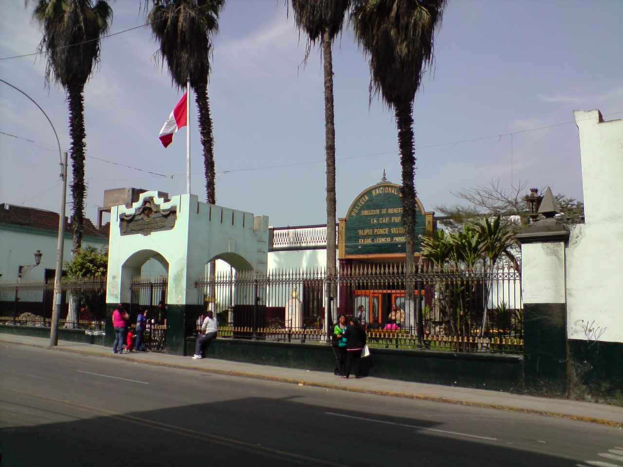 Colegio "Alipio Ponce Vásquez", antiguo local del Hospital de la Misericordia, en Lima.